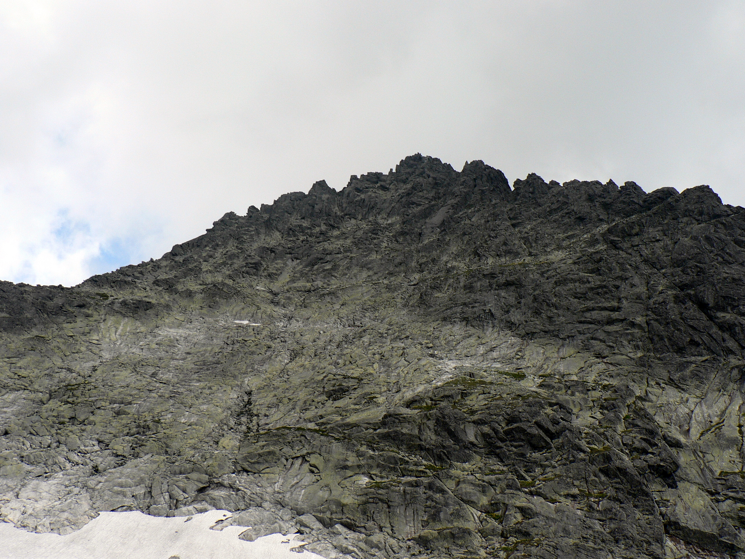 Ciężki Szczyt spod schroniska pod Rysami